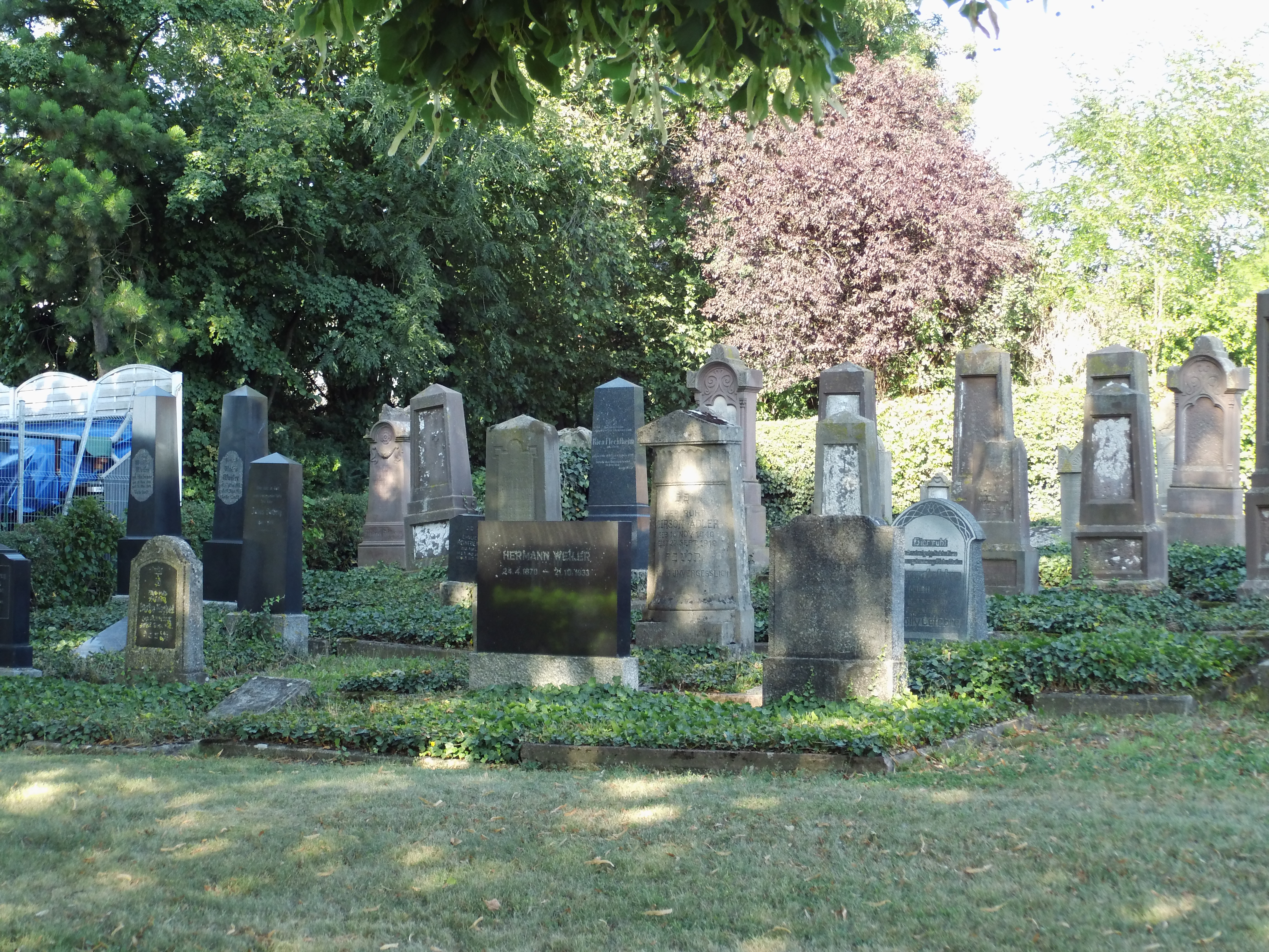 Baudenkmal